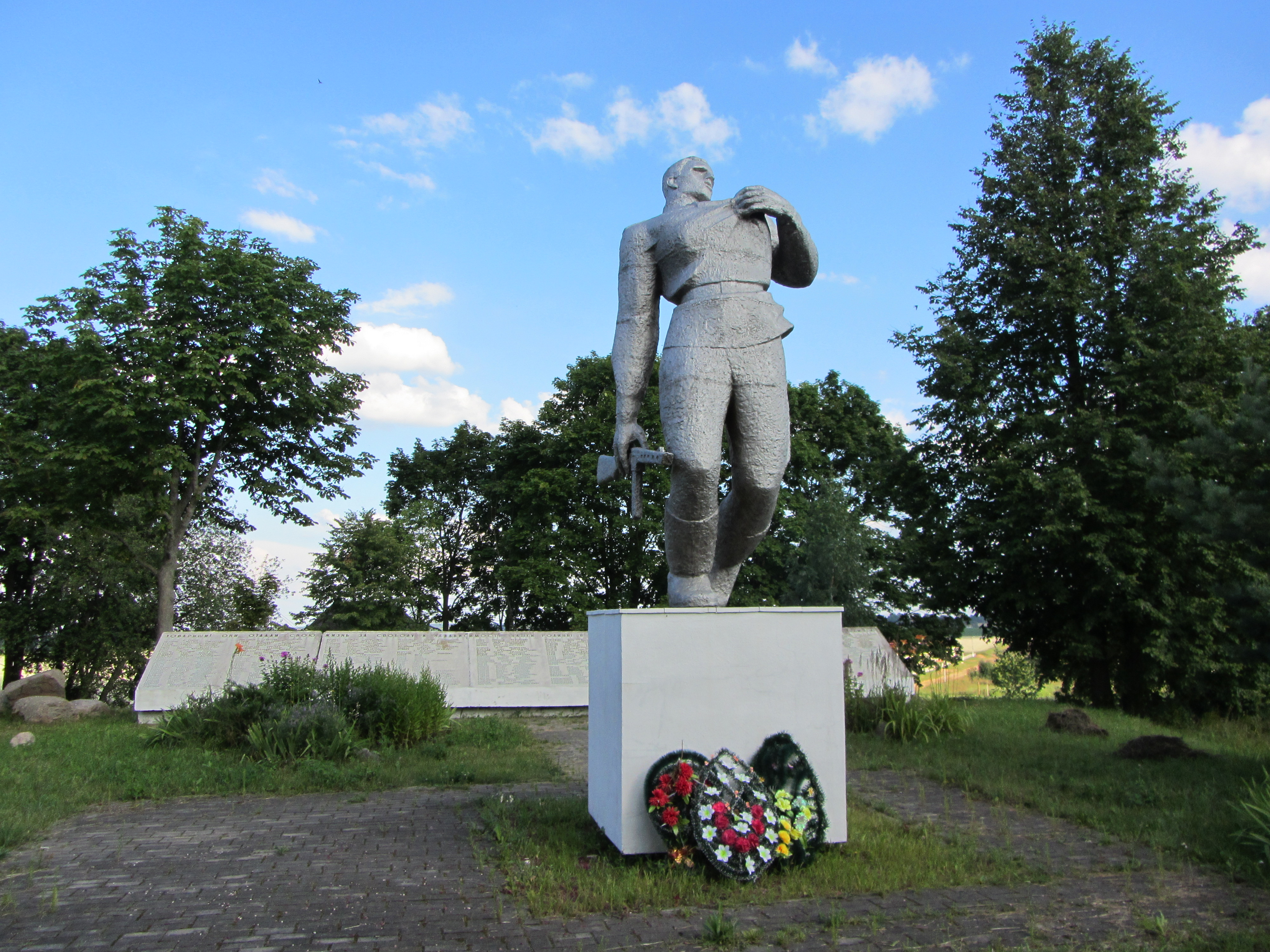 Беларуская (тарашкевіца): «Помнік землякам», Дудзічы.